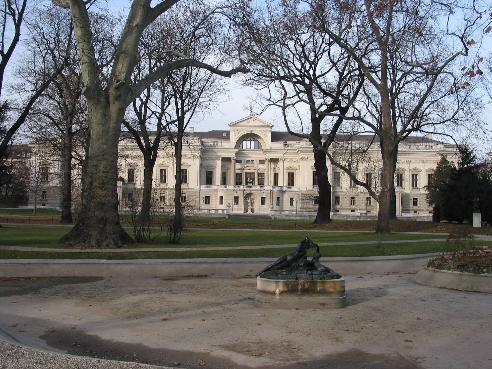 Gartenpalais Liechtenstein (opposite to Palais Liechtenstein), Vienna IX, 2005-12-04